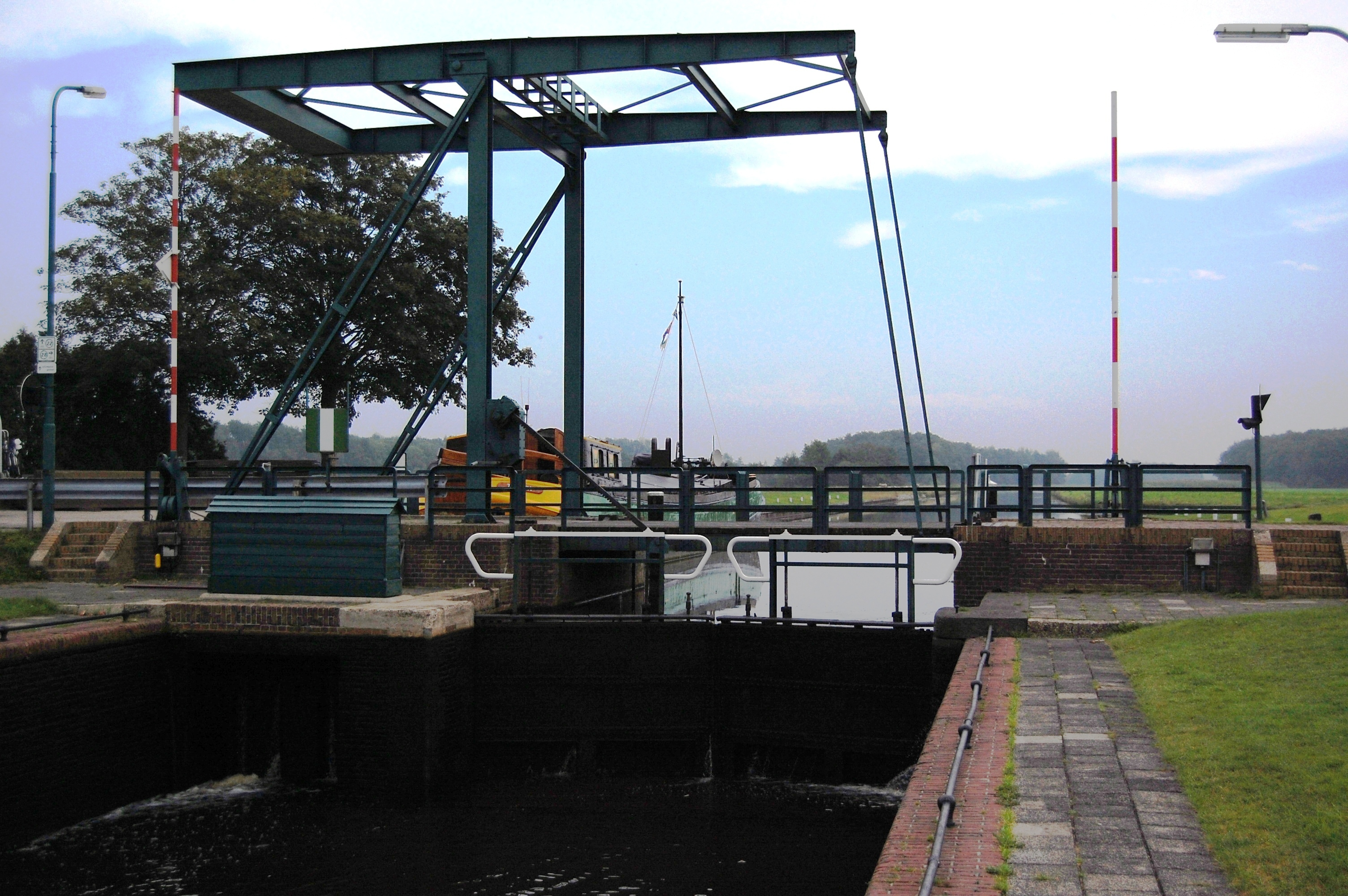 De sluisbrug van Sluis II (nr. 2) in de Tjonger.